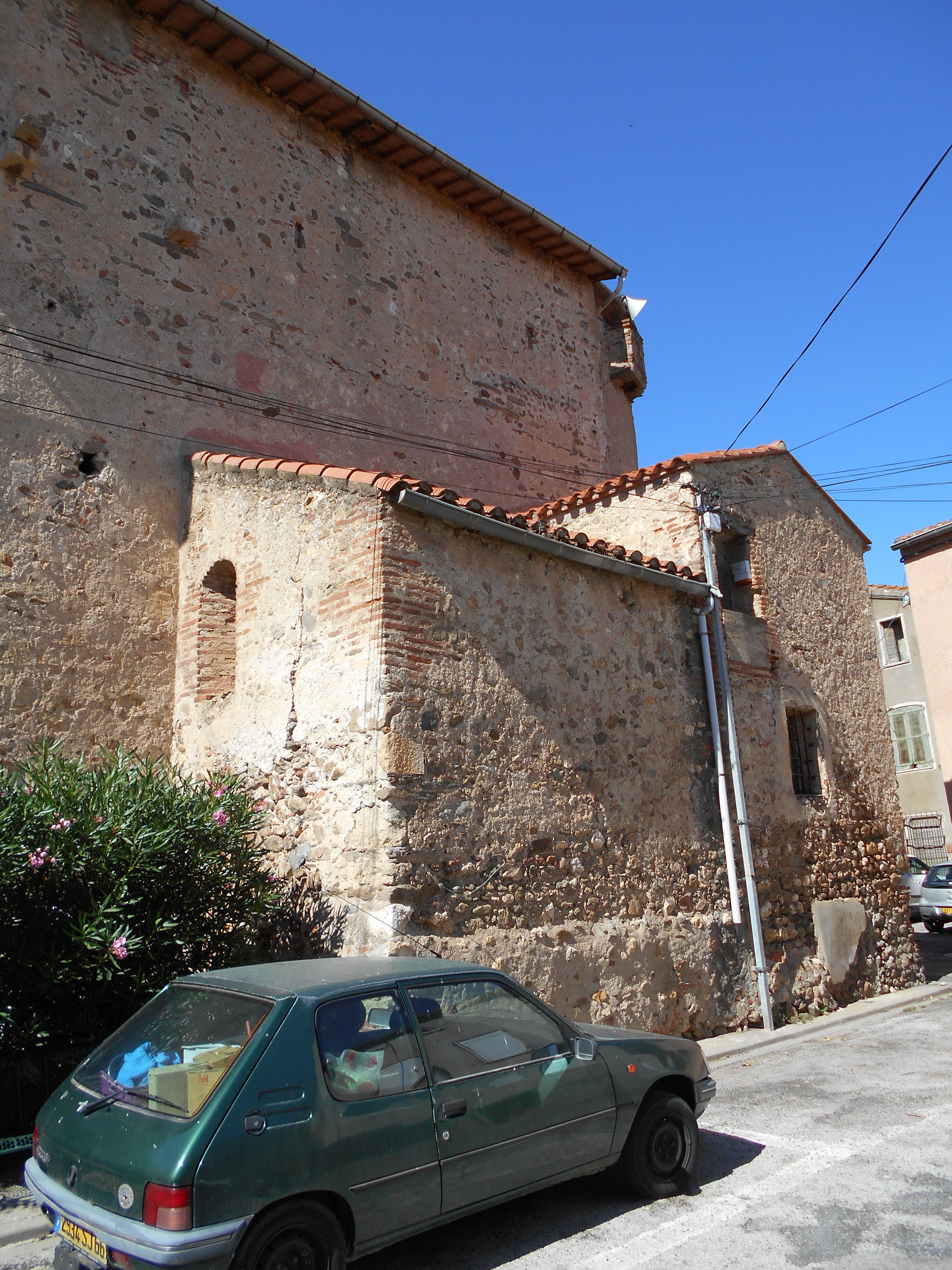 Mur meridional